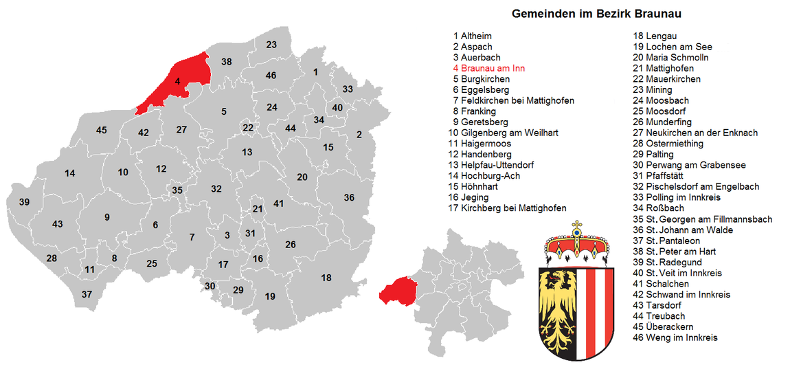 Gemeinden im Bezirk Braunau am Inn